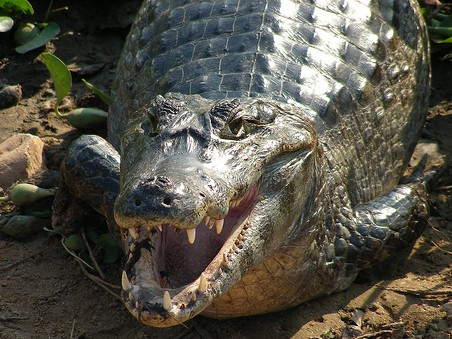 jacare